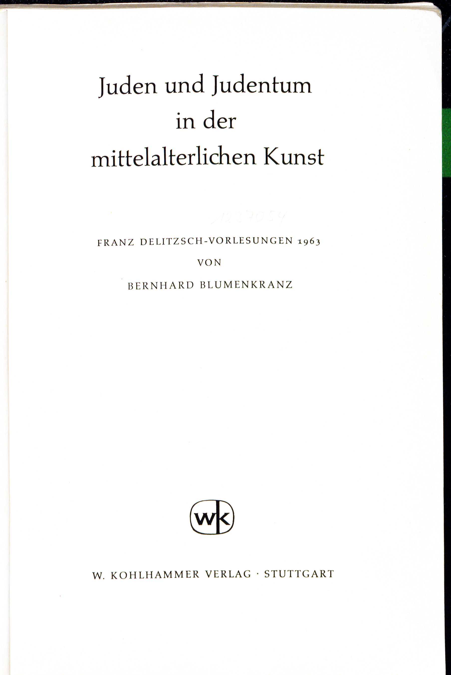 Bernhard Blumenkranz Juden und Judentum in der mittelalterlichen Kunst Stuttgart : Kohlhammer 1965